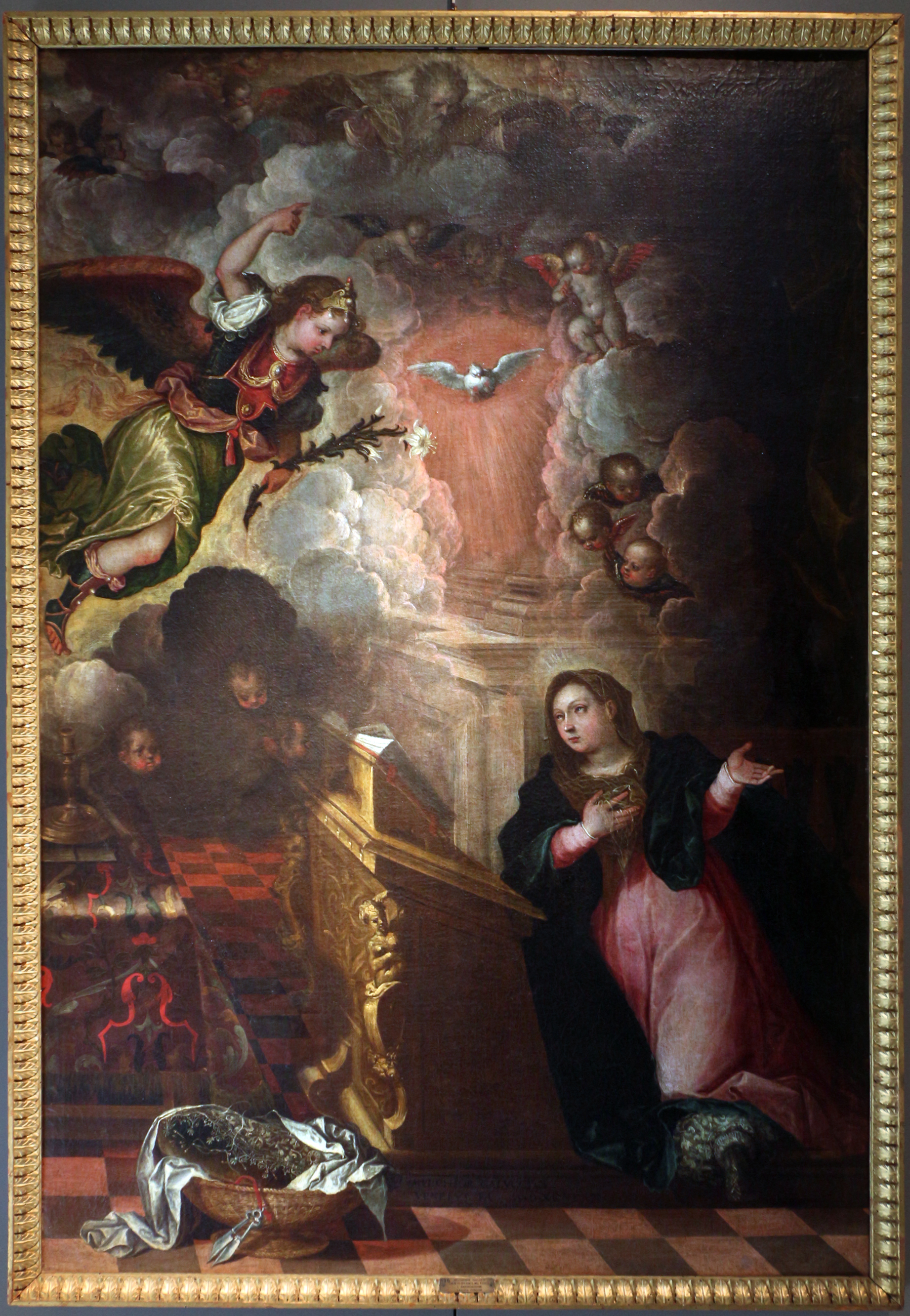 Palazzo Ala Ponzone This is a photo of a monument which is part of cultural heritage of Italy.